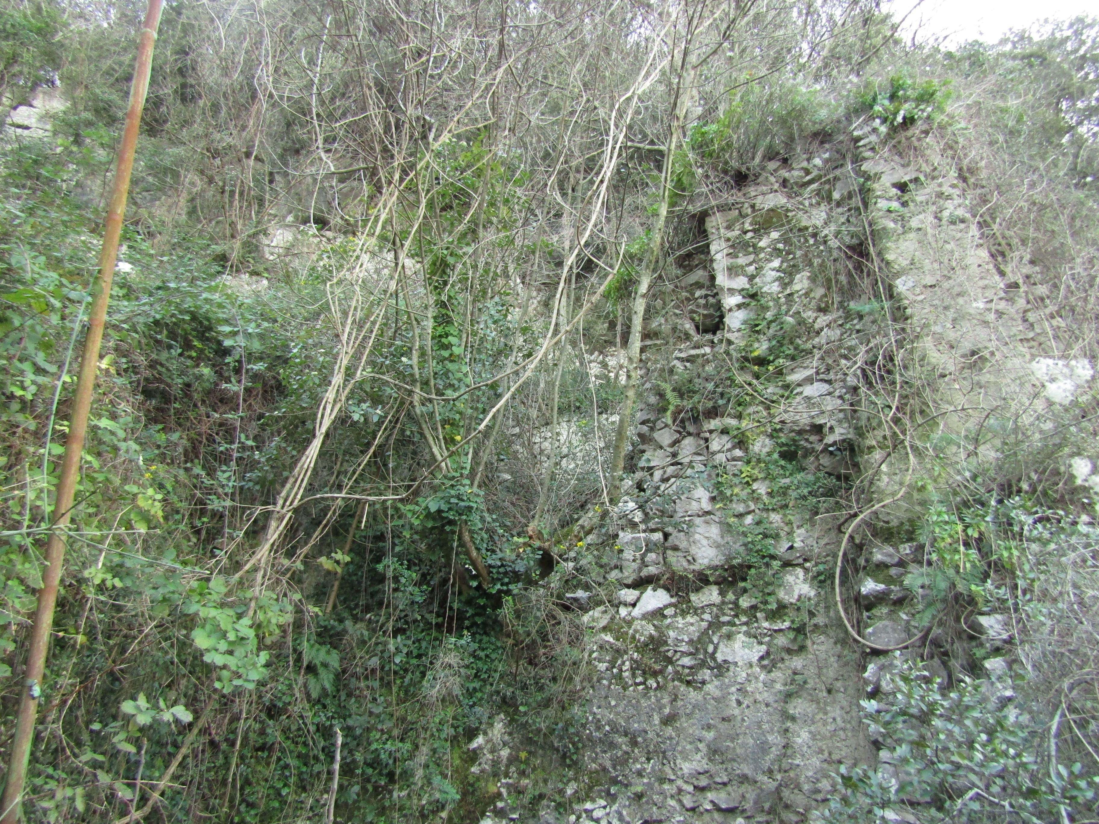 {Informazioni file |Descrizione = Resti della Cappella dei Pigni presso il Santuario a Montalbino, Nocera inferiore. |Fonte = Mariano Rocco |Data = 28/02/2019 |Autore = Mariano Rocco |Licenza = vedi sotto |Detentore copyright = Mariano Rocco |EDP = |Altre versioni =}